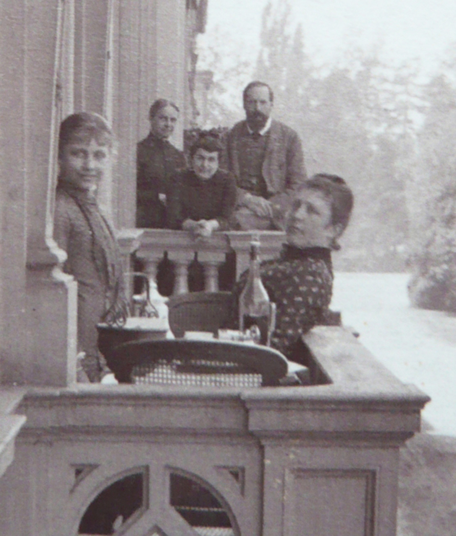 Goltsteinstraße 22 und 23 Düsseldorf (Ausschnitt), Rückseite Text: Juni 1886 Düsseldorf Goltsteinstrasse Friedliches Balkonleben photographiert von Ernst Matthes vom Balkon Goltsteinstr. 21 auf Balkon der No. 22 zu sehen: Agnes Matthes Bertha Matthes auf Balkon der No. 23: Frau Alfred Rethel Else Sohn Carl Sohn Die Jubilarin Mira war damals 2 Jahre 3 Monate